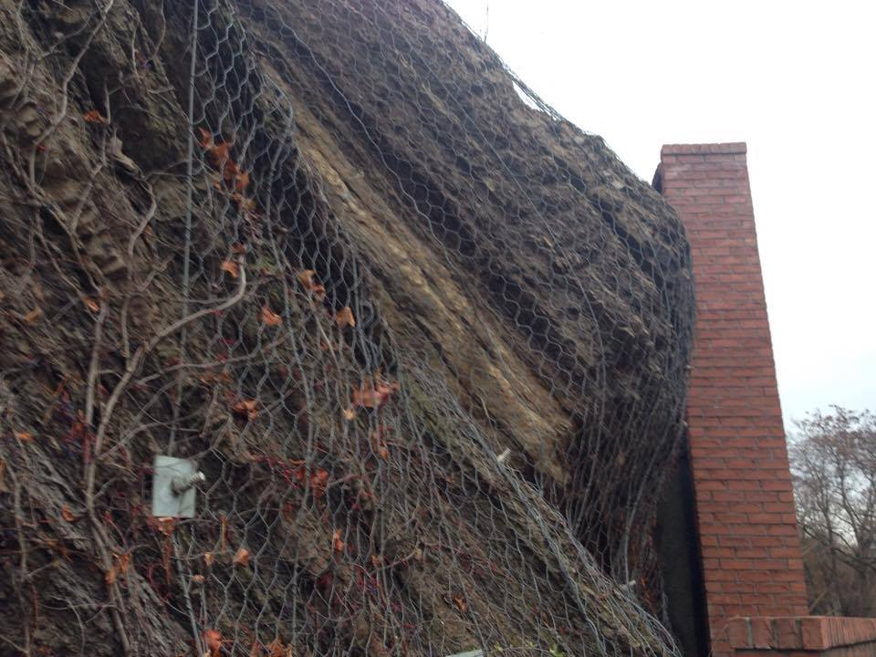 spevnenie skalného odkryvu